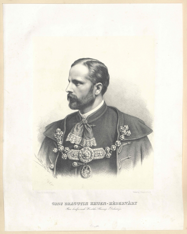 Khuen-Héderváry, Karl Graf